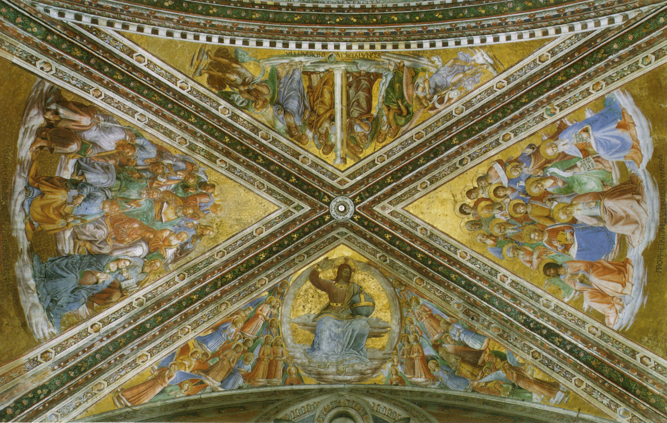 Angelico, cappella di san brizio